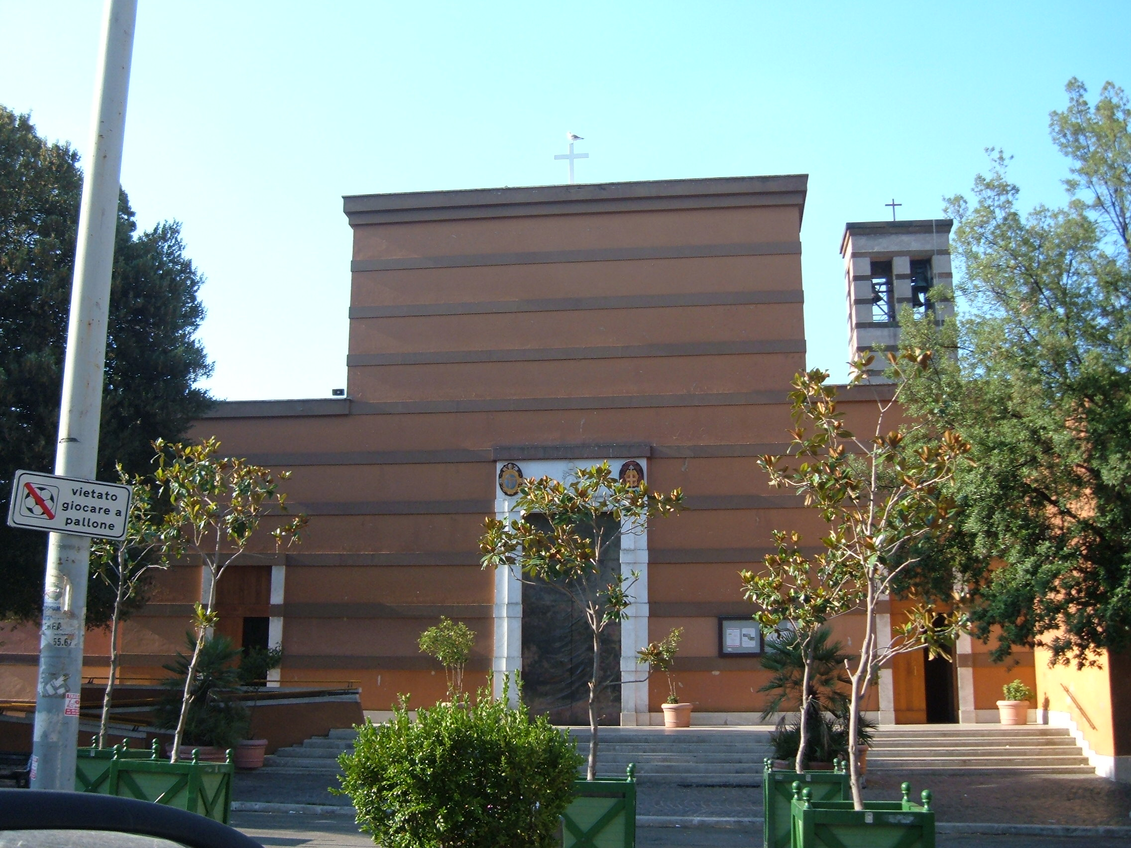 Chiesa della Trasfigurazione di Nostro Signore Gesù Cristo, a Roma, nel quartiere Gianicolense.